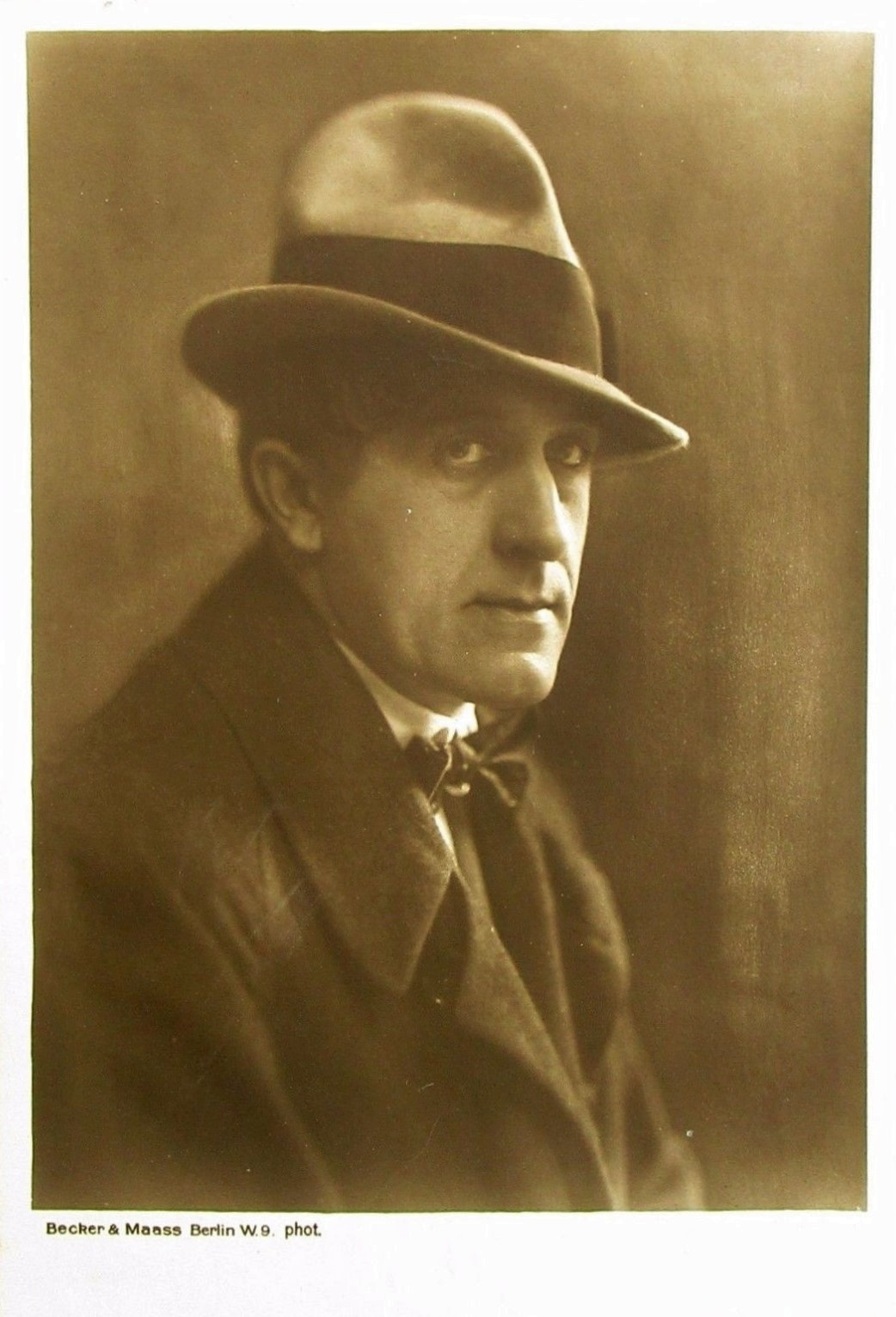 Der Schauspieler Hans Mierendorff um 1920. Photopostkarte des Ateliers (Otto) Becker & (Heinrich) Maass